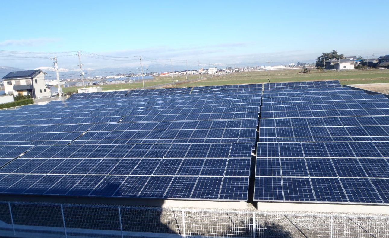 海津発電所